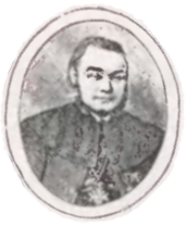 Filip Nikitycz Diaczan (ros. Филипп Никитич Дьячан, ukr. Пилип Микитович Дячан), 1831-1906) – ukraińsko-rosyjski filolog klasyczny, historyk starożytności.